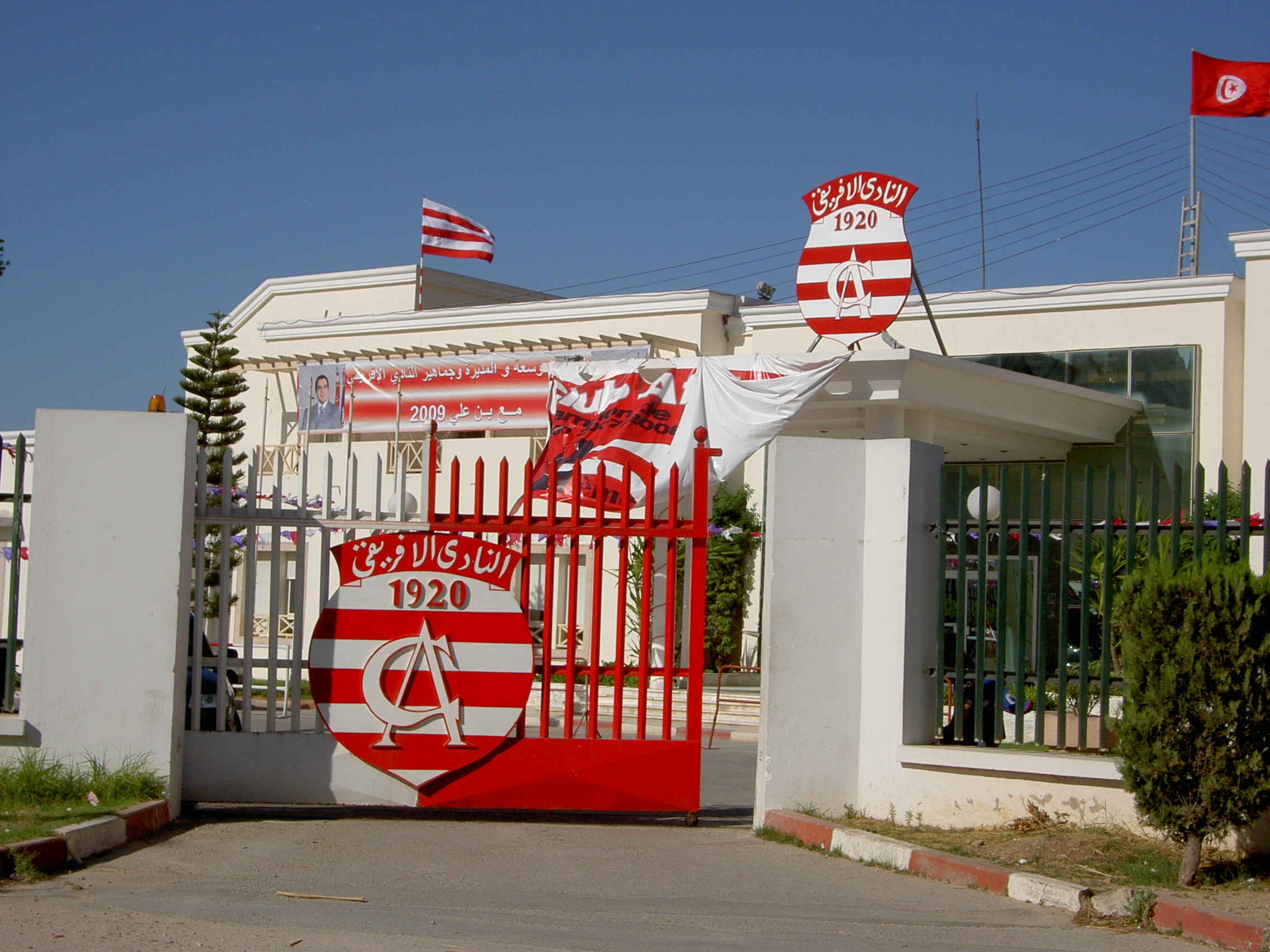 Parc A du Club Africain, Avenue du Maghreb Arabe, Tunis, Tunisie